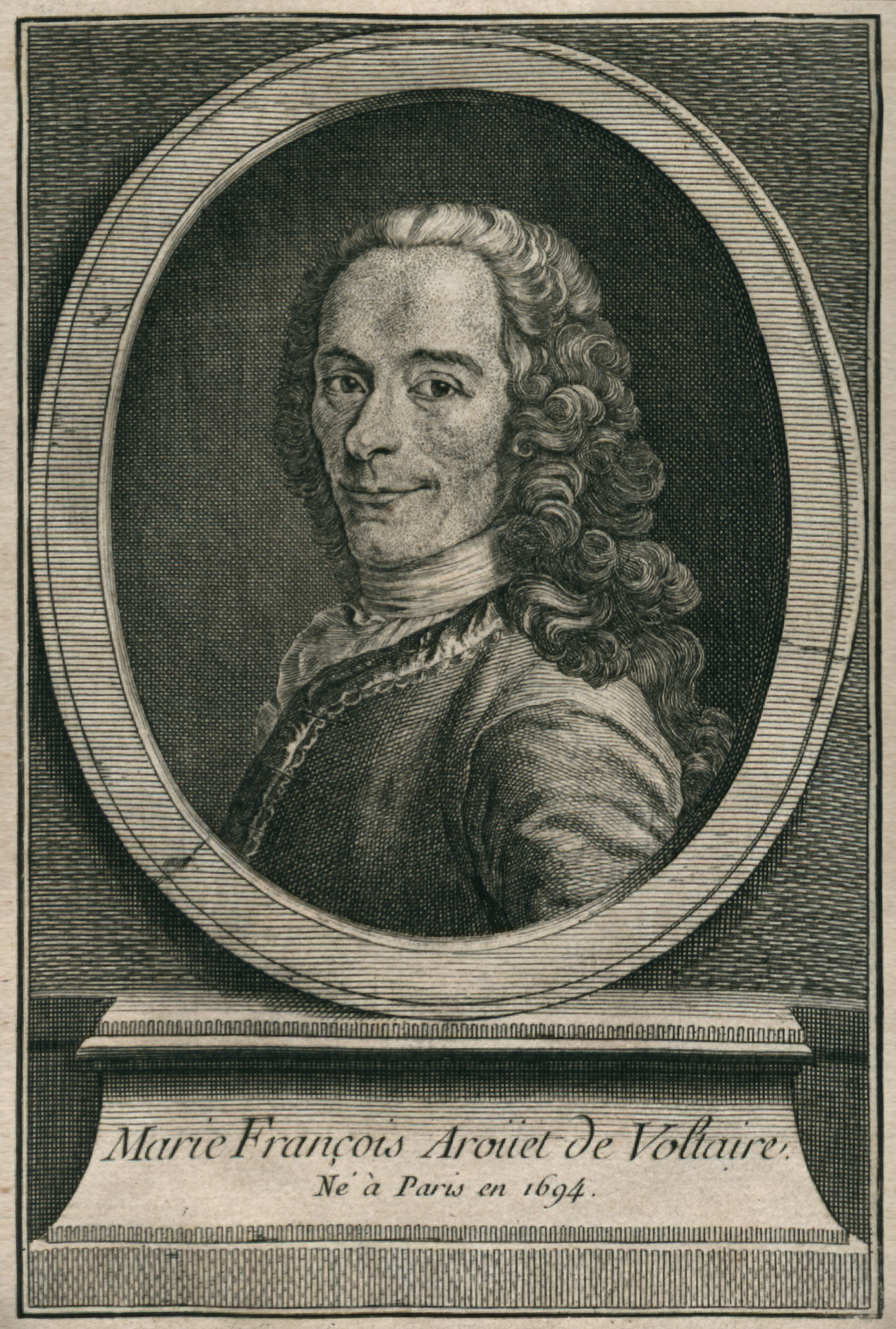 Élémens de la philosophie de Neuton, donnés par Mr de Voltaire. - Nouvelle edition. - A Londres